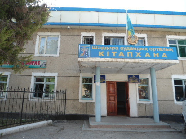 Шардара орталықтандырылған кітапханалар жүйесі